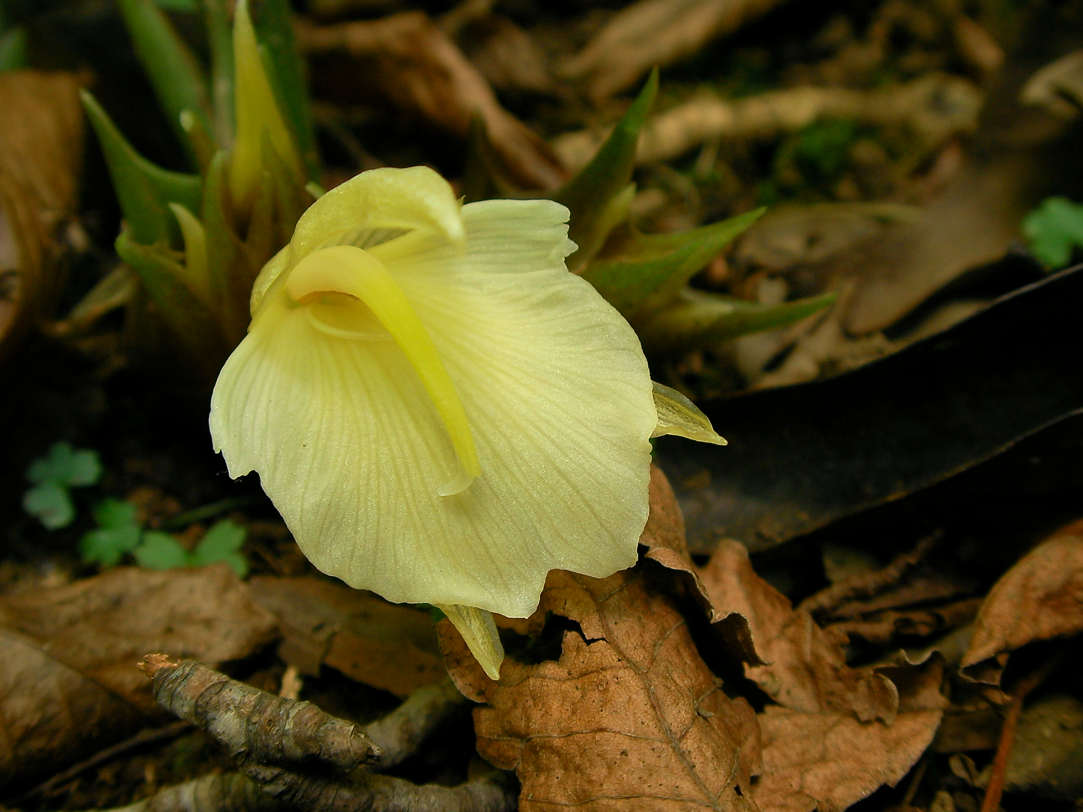 ミョウガ[茗荷][Zingiber mioga]-花